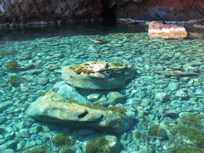 Shore of Capraia Isola. Cala Rossa. Fondale. Within the Arcipelago Toscano National Park and marine sanctuary.